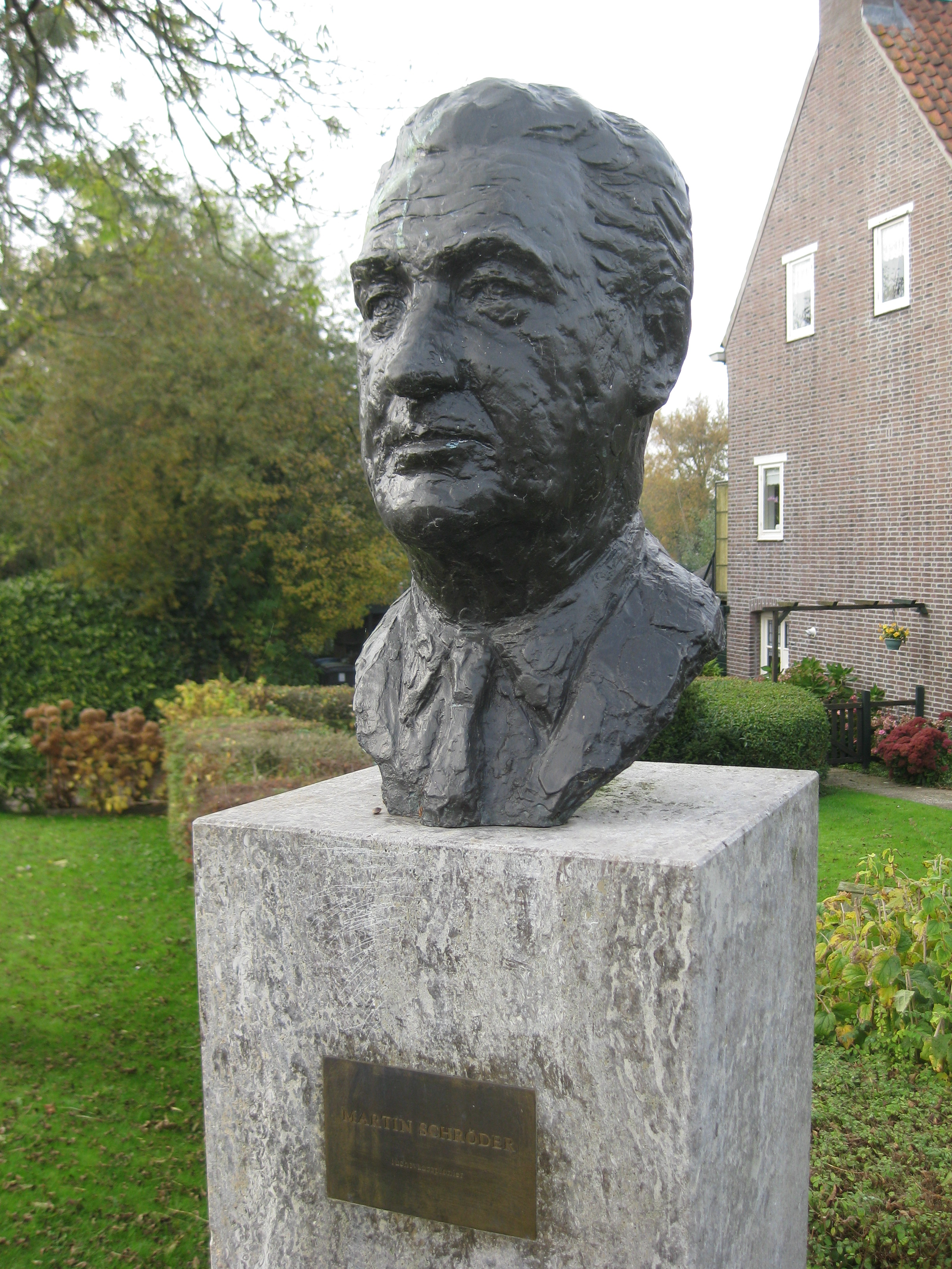 Standbeeld van Martin Schröder door Pieter de Monchy in Ouderkerk aan de Amstel 1998